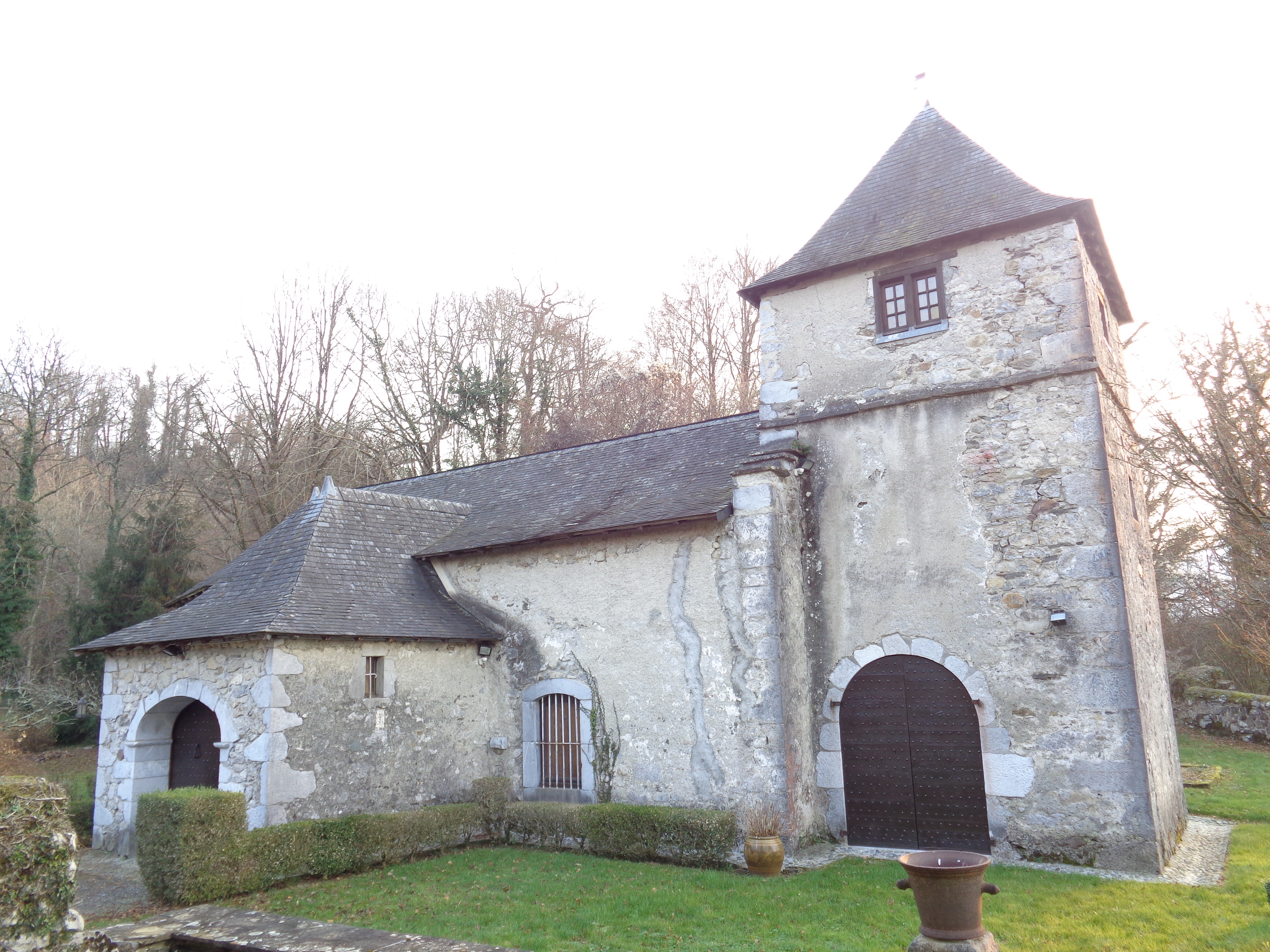 Ancienne chapelle maintenant privée, hameau de Meyrac